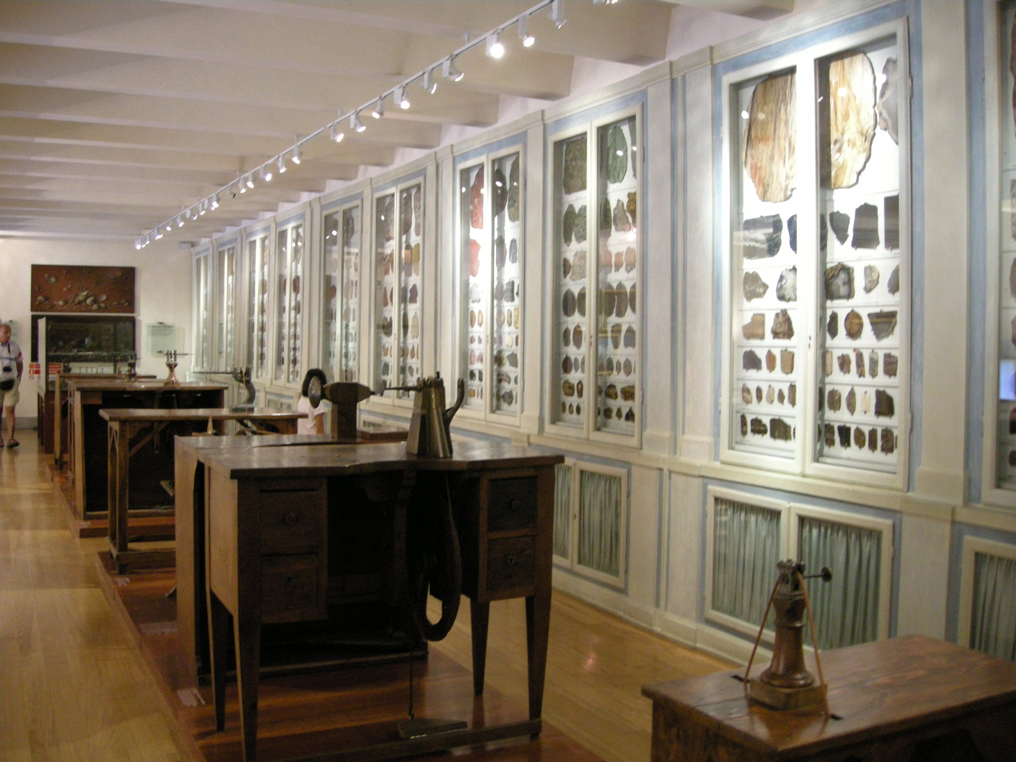 Opificio